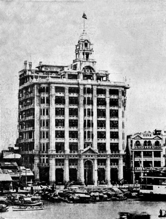 廣州市西堤大新公司（今南方大厦）